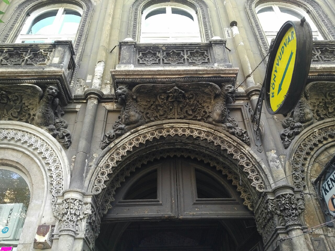 Őrző-védő és erkélyeket alátámasztó griffek az Unger-ház Múzeum körúti bejárata fölött.